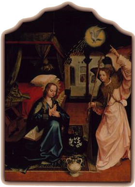 O retábulo "do Paraíso", assim designado uma vez que provém do altar-mor do extinto Convento do Paraíso em Lisboa, foi já objecto de alguns estudos que resultaram em opiniões diversas e divergentes no que toca à sua autoria. Num primeiro momento, o conjunto foi atribuído a Grão Vasco (Vasco Fernandes) por Taborda e Cirilo, opinião refutada por Raczynski, que propôs o nome de Abram Prim (Primus). Carl Justi apontou como autor o pintor Velascus e Émile Bertaux dividiu a série em dois conjuntos, atribuindo a "Anunciação", a "Visitação" e a "Natividade" a Cristóvão de Figueiredo, e os restantes painéis ao "Mestre do Retábulo de Santiago". Foi, porém, José de Figueiredo quem reagropou novamente as oito pinturas e as enquadrou na obra do "Mestre do Paraíso", no que foi secundado por Reinaldo dos Santos. A Myron Malkiel-Jirmounsky coube alertar para o facto de estarmos na presença de uma obra colectiva e não de um só pintor. Actualmente, e na esteira deste último historiador, ainda que se destaque o nome de Gregório Lopes na atribuição deste conjunto retabular, não há dúvida em se afirmar que se trata de uma obra de parceria, o que é desde logo visível na heterogeneidade pictórica e técnica das várias tábuas que o compõem.